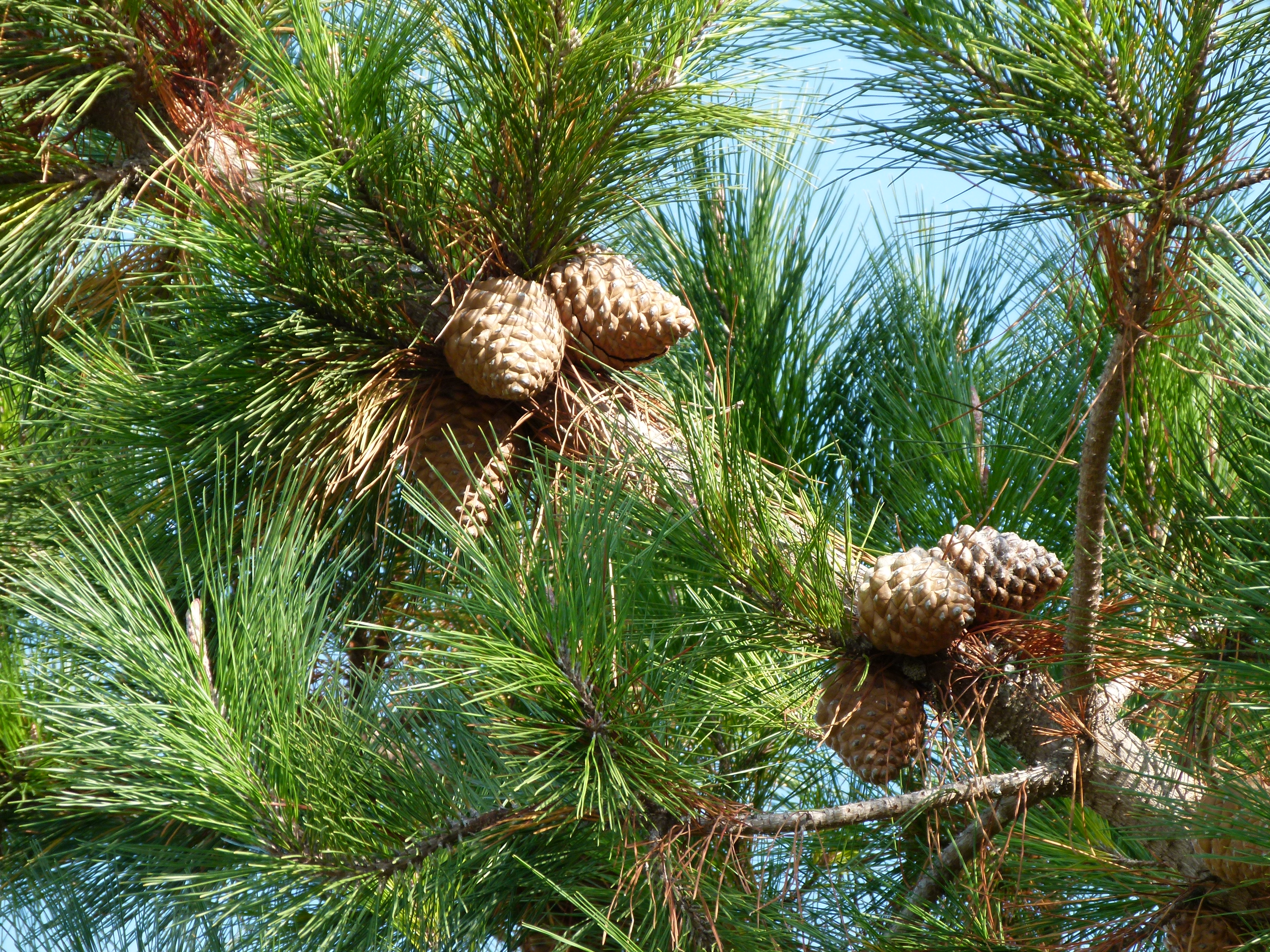 Jardin botanique Barcelone